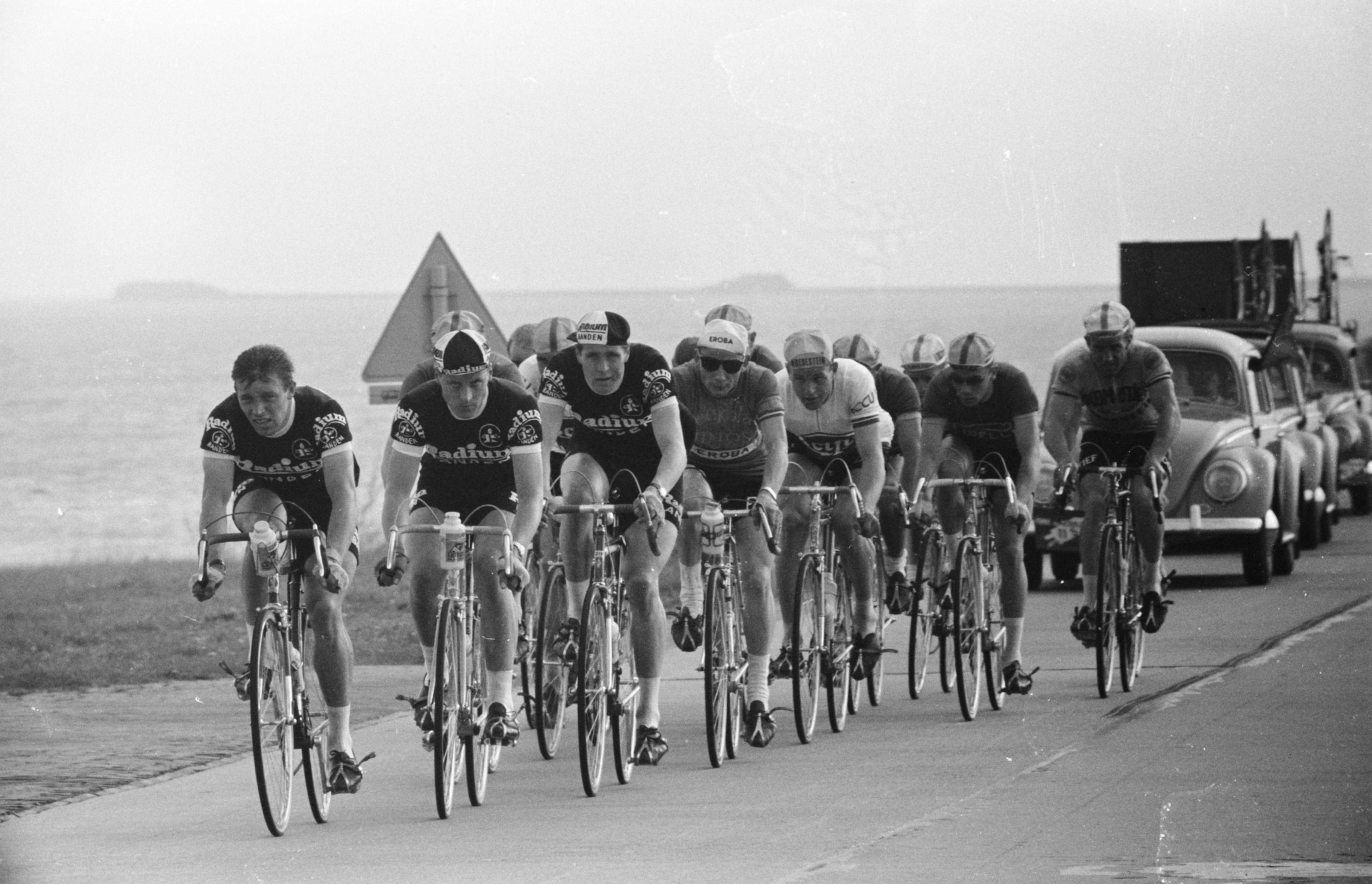 Collectie / Archief : Fotocollectie Anefo Reportage / Serie : [ onbekend ] Beschrijving : Ronde van Nederland. Eerste etappe Amsterdam Heerenveen, kopgroep van 14 man op de Afsluitdijk Datum : 10 mei 1960 Locatie : Afsluitdijk Trefwoorden : etappes, kopgroepen, wielrennen, wielrenners Fotograaf : Pot, Harry / Anefo Auteursrechthebbende : Nationaal Archief Materiaalsoort : Negatief (zwart/wit) Nummer archiefinventaris : bekijk toegang 2.24.01.05 Bestanddeelnummer : 911-2402